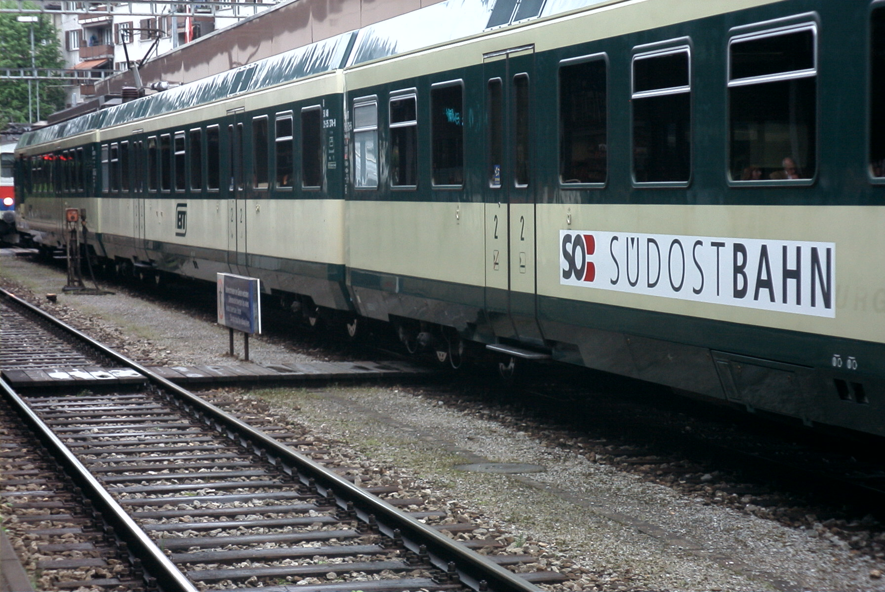 ABt 172 mit neuem SOB-Signet, B 374 mit ursprünglichem BT-Signet in Herisau